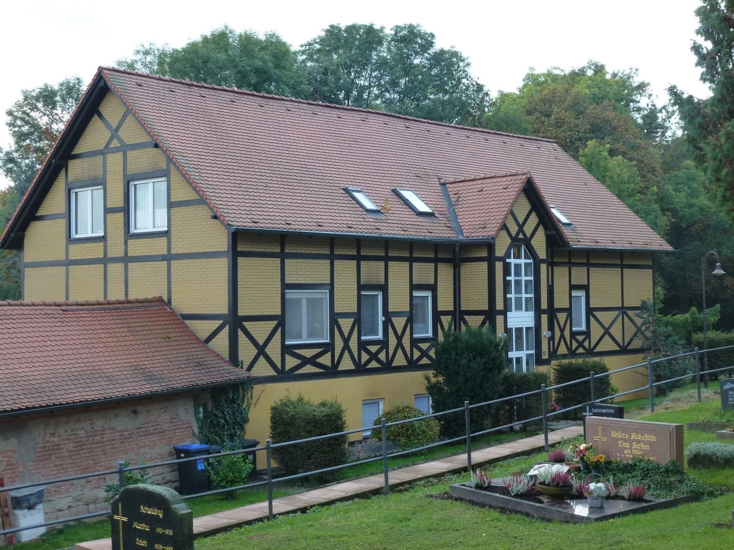 Fachwerk in Eulau